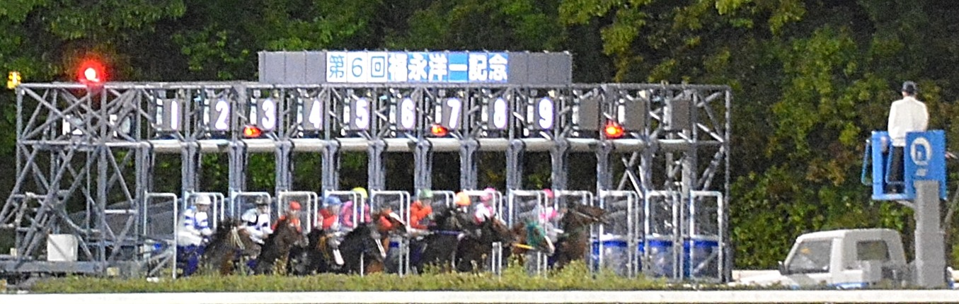 2015年4月29日に高知競馬場で行われた「第6回福永洋一記念」でスタート直後の状況を、観客席から撮影。